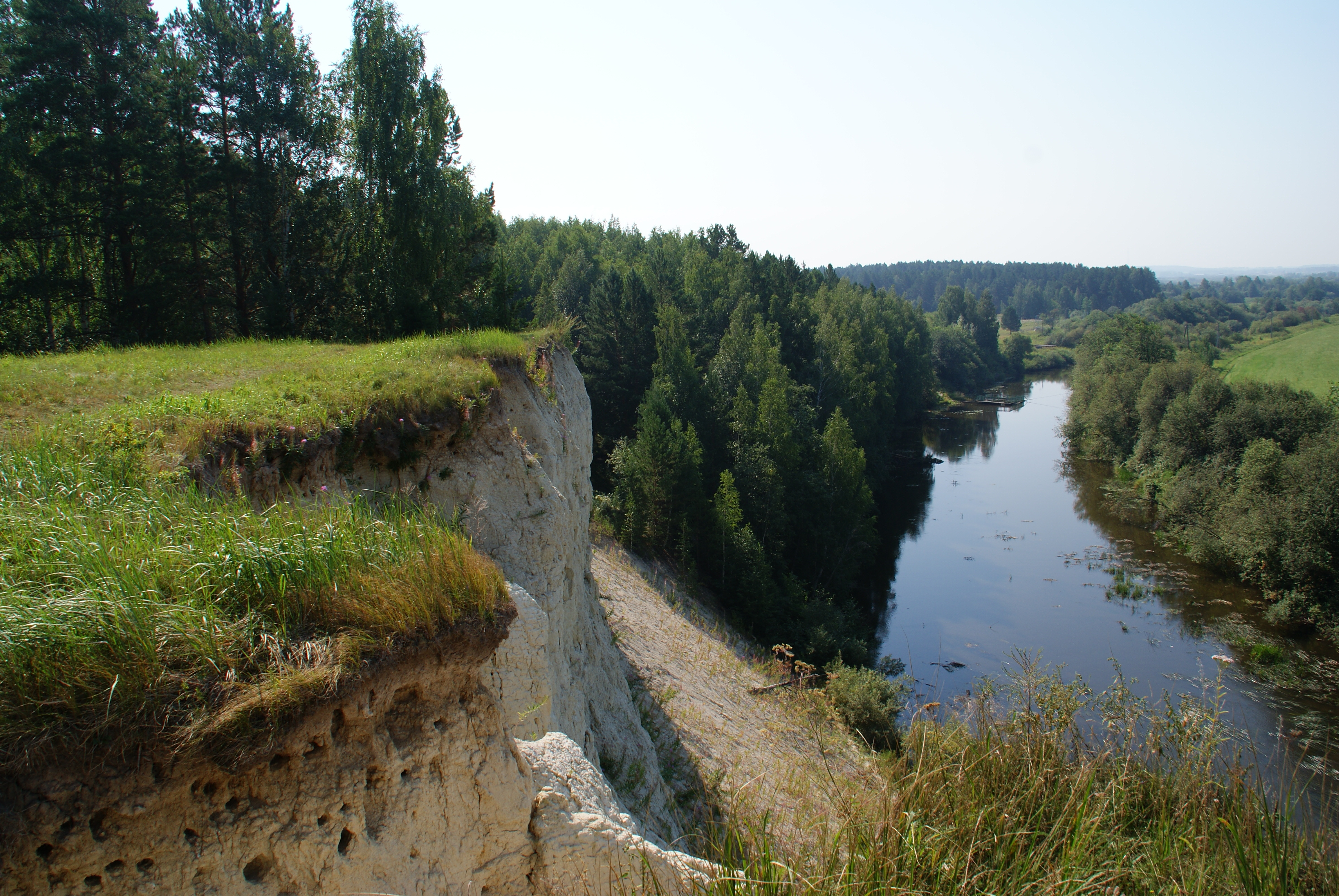 Обнажение "Белая горка", Ирбитский район This image is related to the protected area of Russia number 6610284